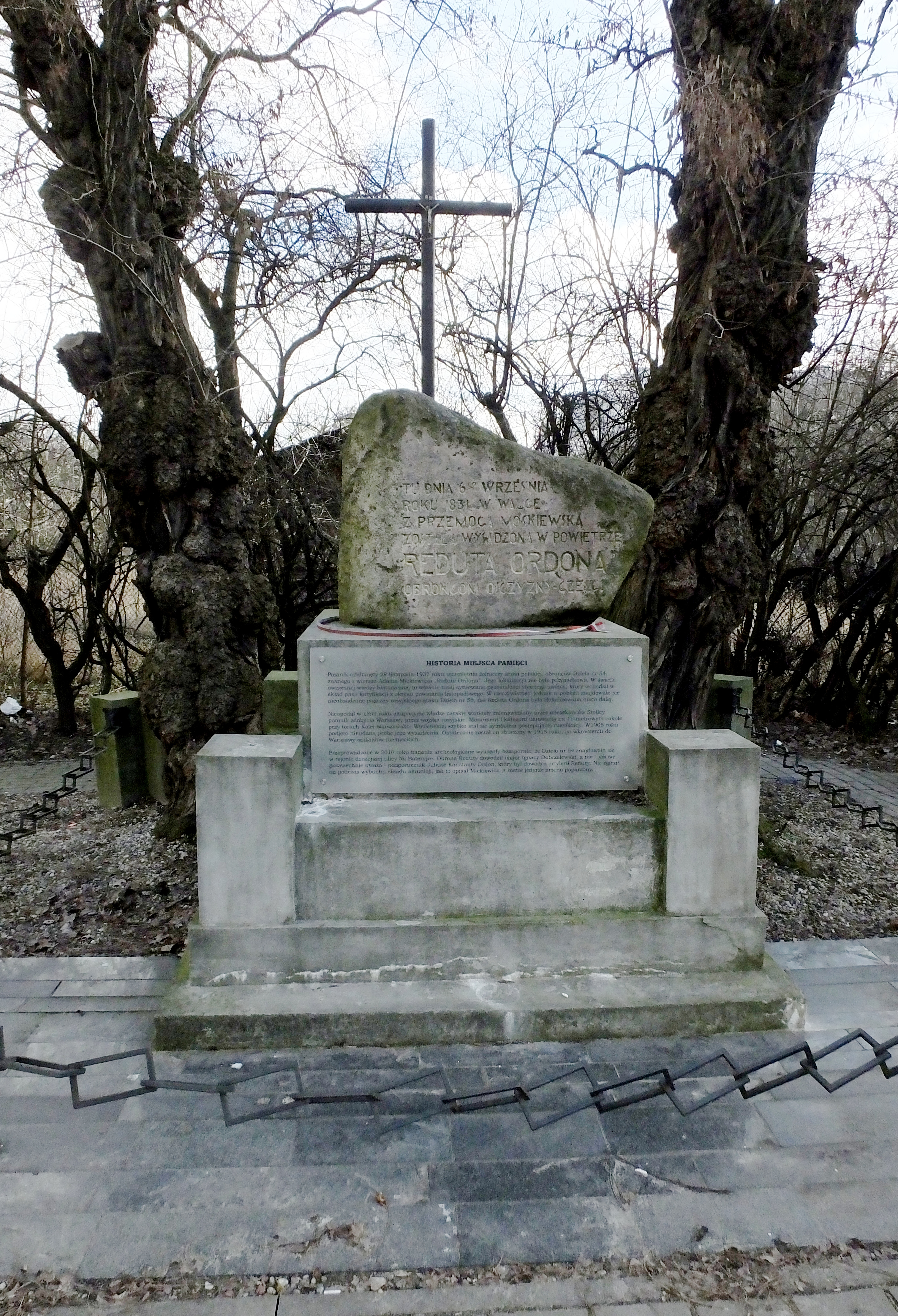 Pomnik upamiętniający Redutę Ordona na miejscu błędnie przypisywanym jej umiejscowieniu, tj. na rogu ulic Mszczonowskiej i Włochowskiej w Warszawie